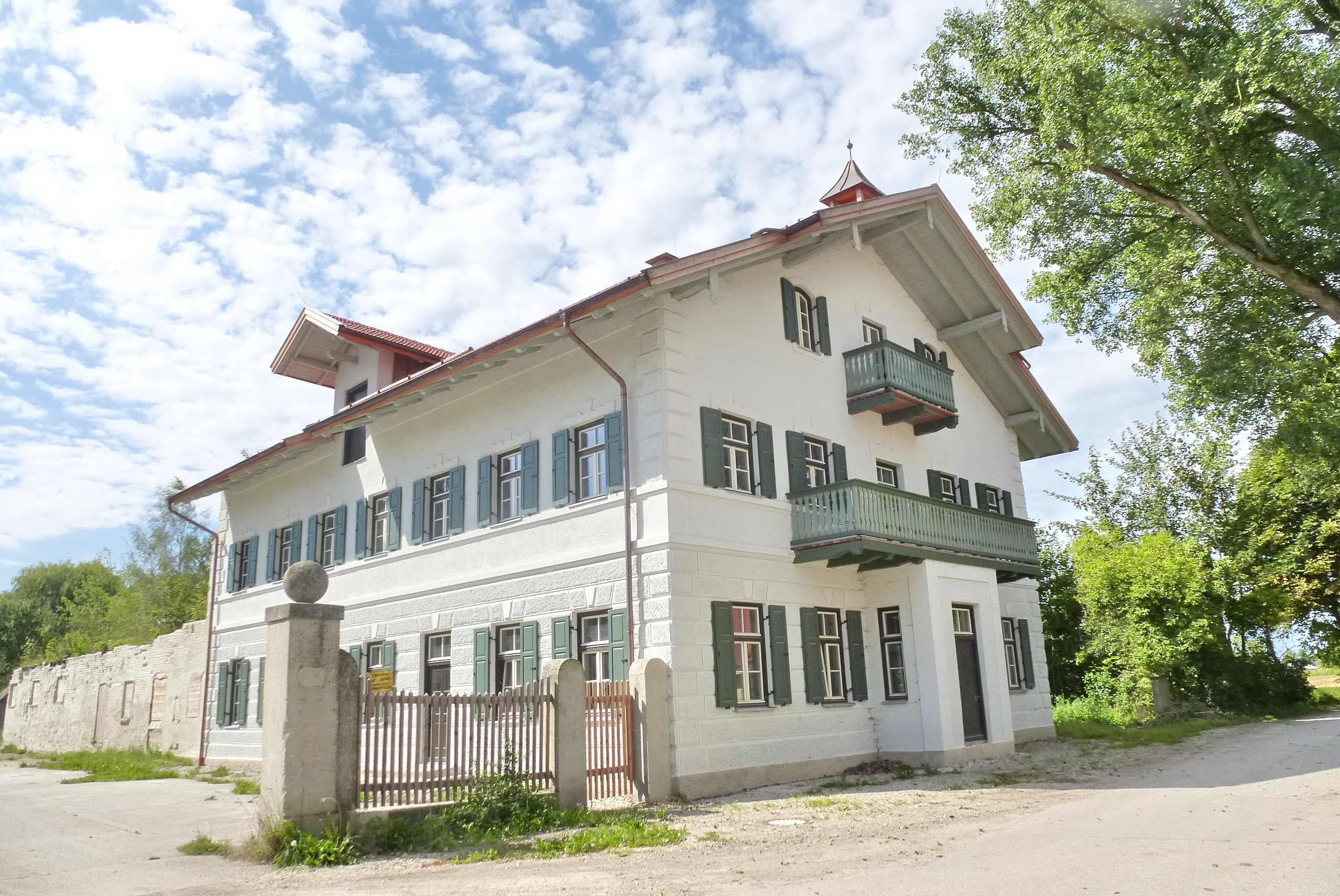 Denkmalgeschützter ehemaliger Gutshof "Goldachhof" in Ismaning, Mayerbacher Straße 130, Landkreis München